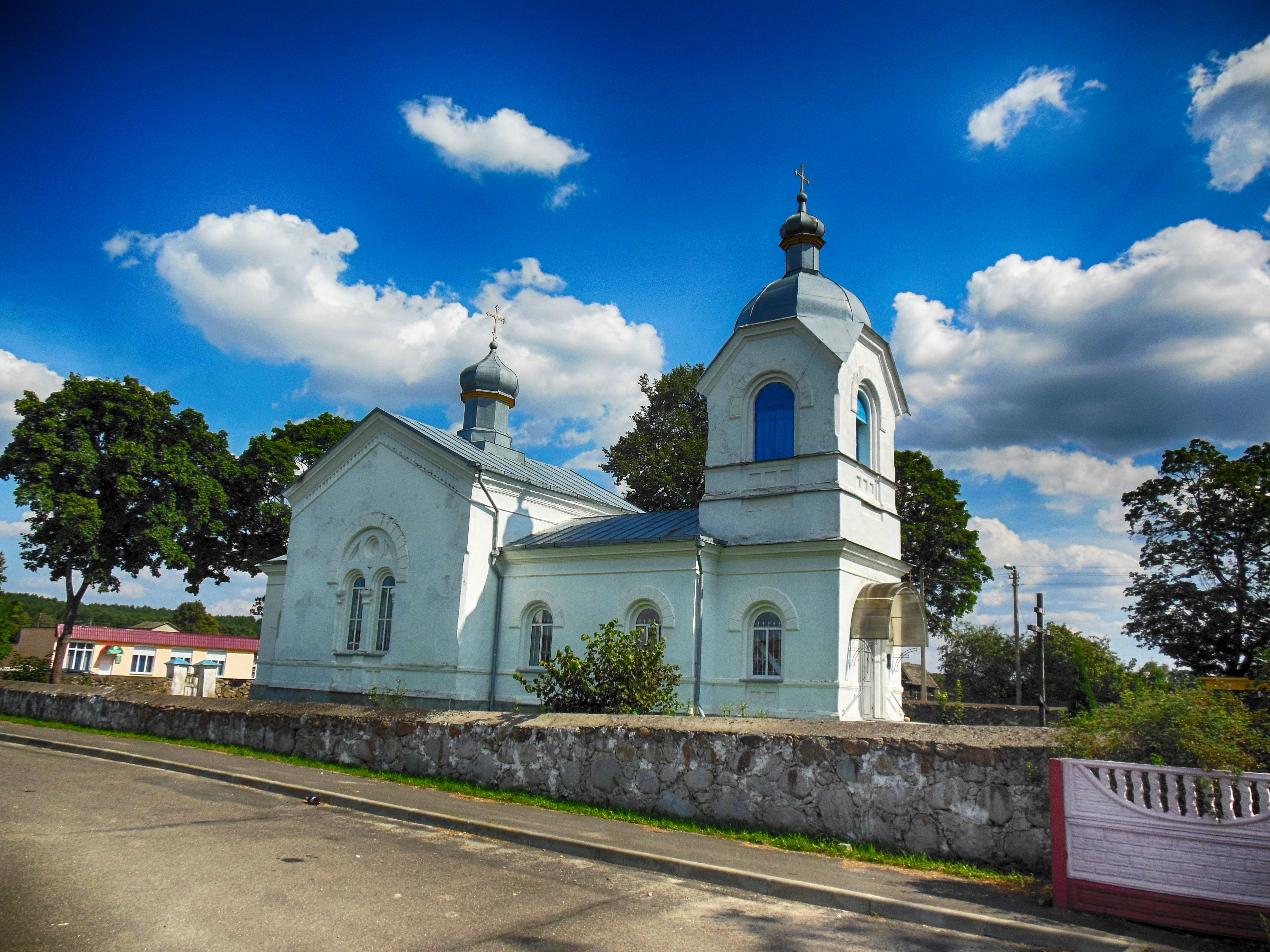 Беларуская (тарашкевіца): Пакроўская царква, в. Дварэц Дзятлаўскага раёну